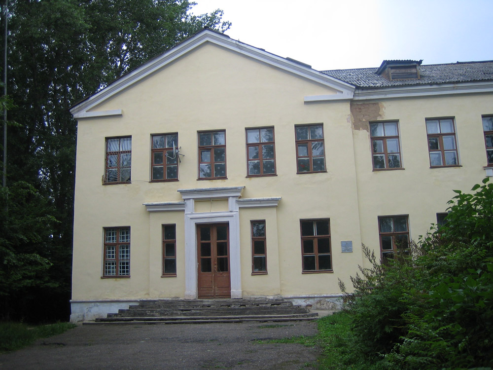 Каснянская школа